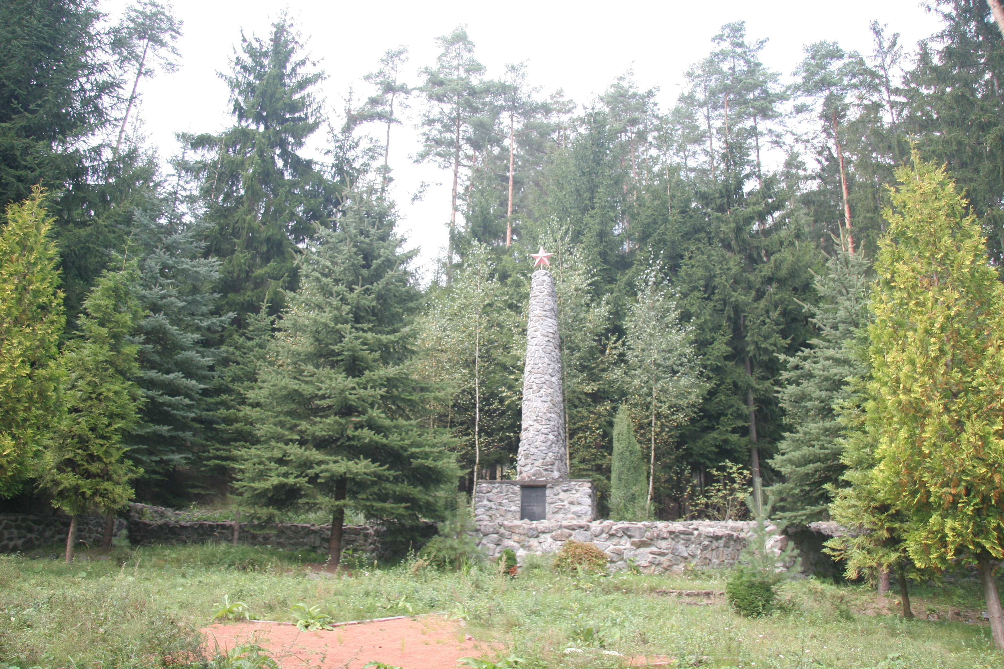 Pomník a lesní hřbitov 143 zajatců (Víska u Jevíčka), Víska u Jevíčka